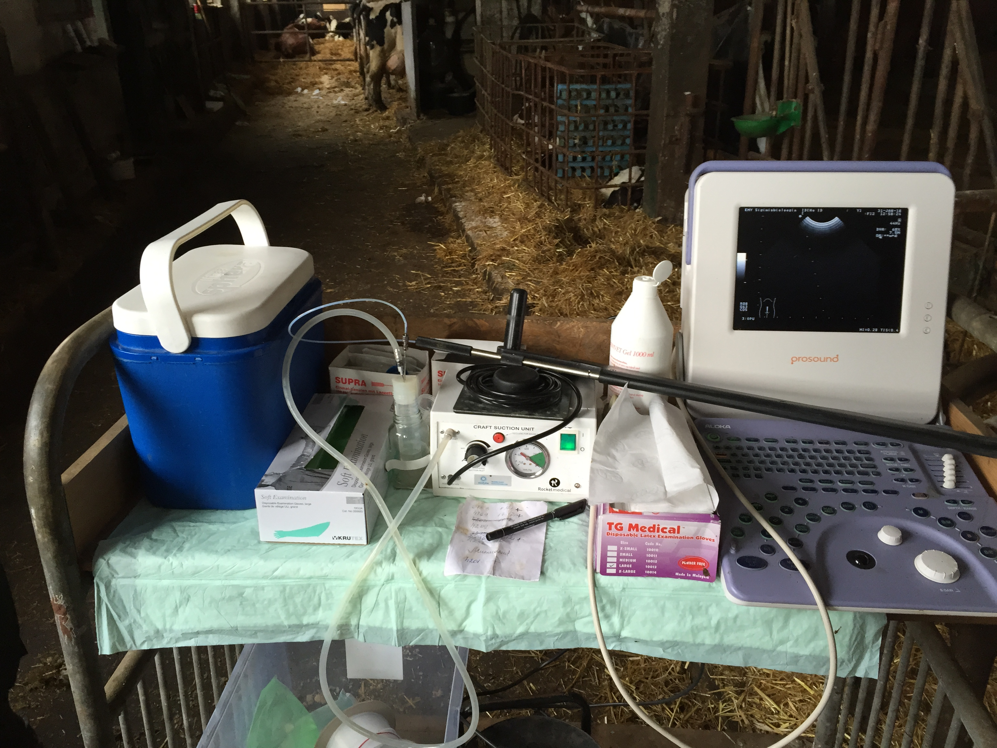 In vitro viljastamiseks saadakse munarakke transvaginaalse folliikulipunktsiooni abil ultraheliaparaadi kontrolli all